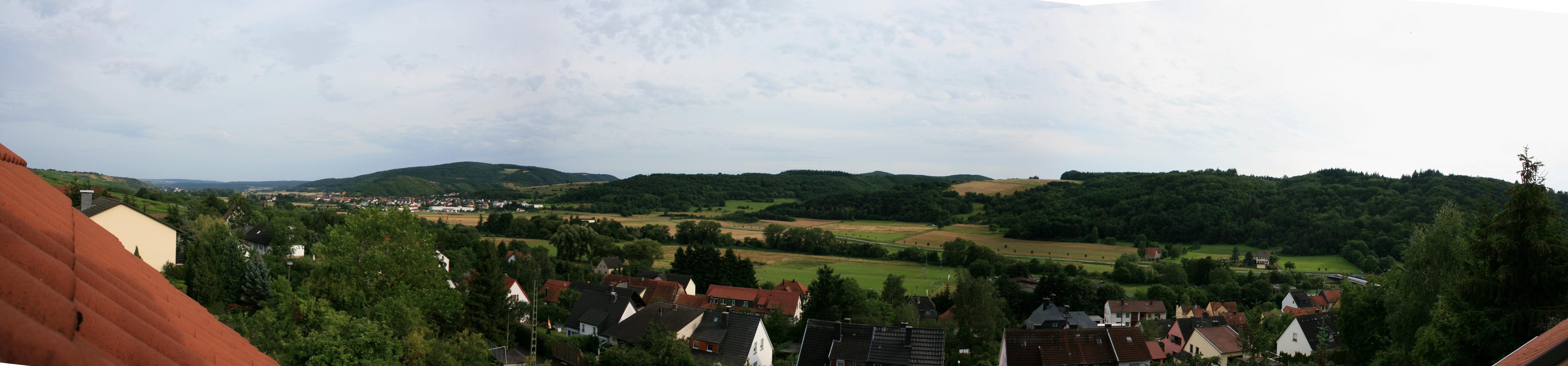 Panorama de Martinstein